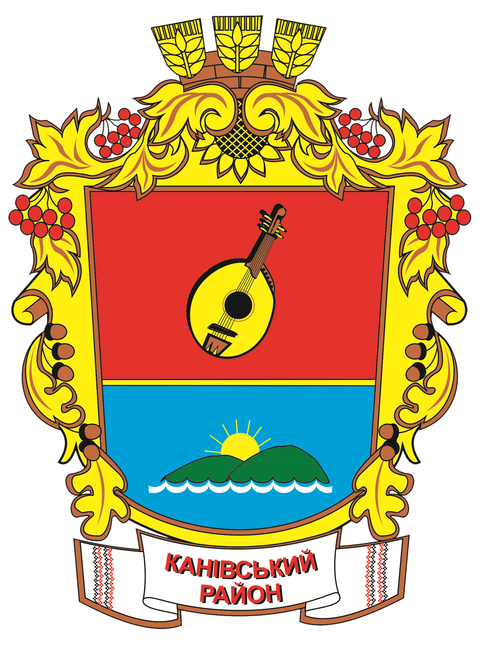 Герб Канівського району